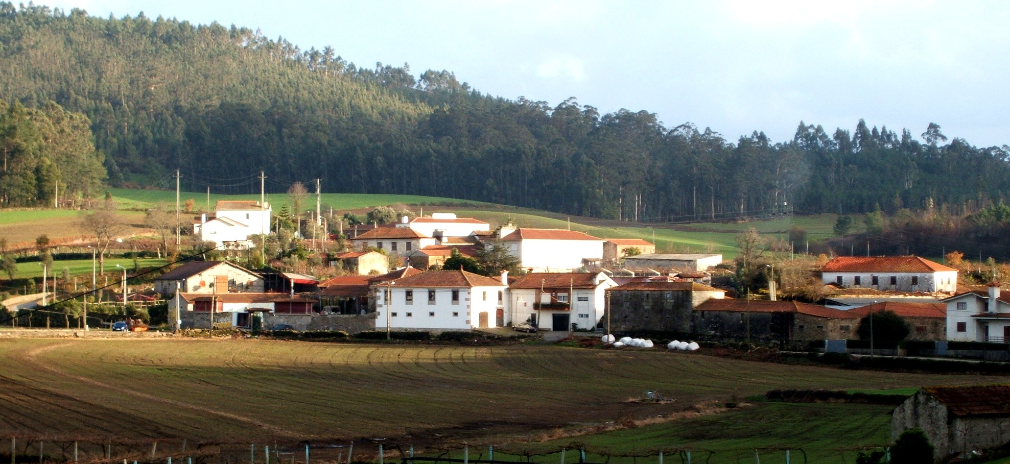 O lugar de Gresufes, um dos lugares mais bonitos e rurais de Balasar